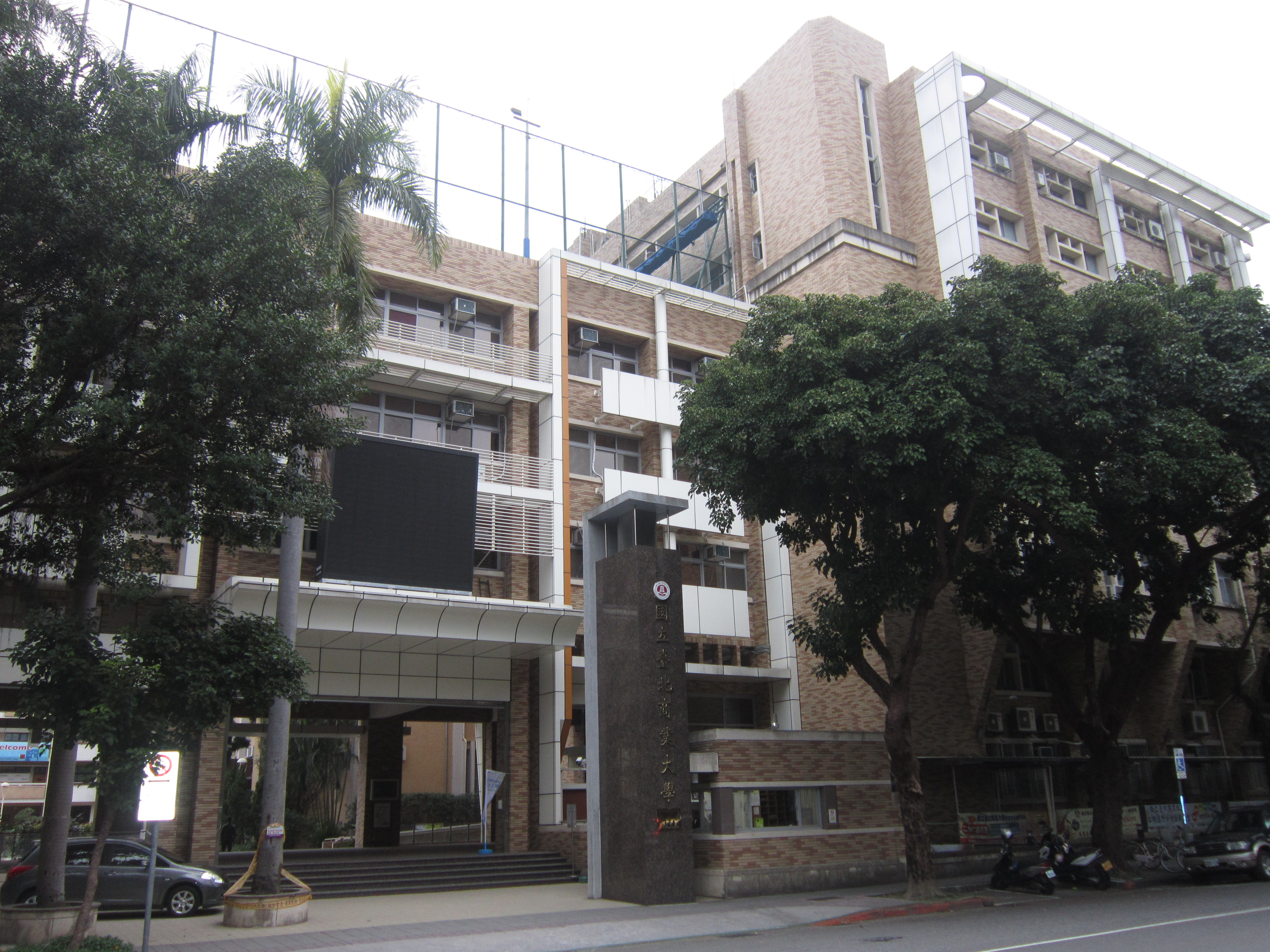 中文（台灣）: 國立臺北商業大學臺北校區正門。